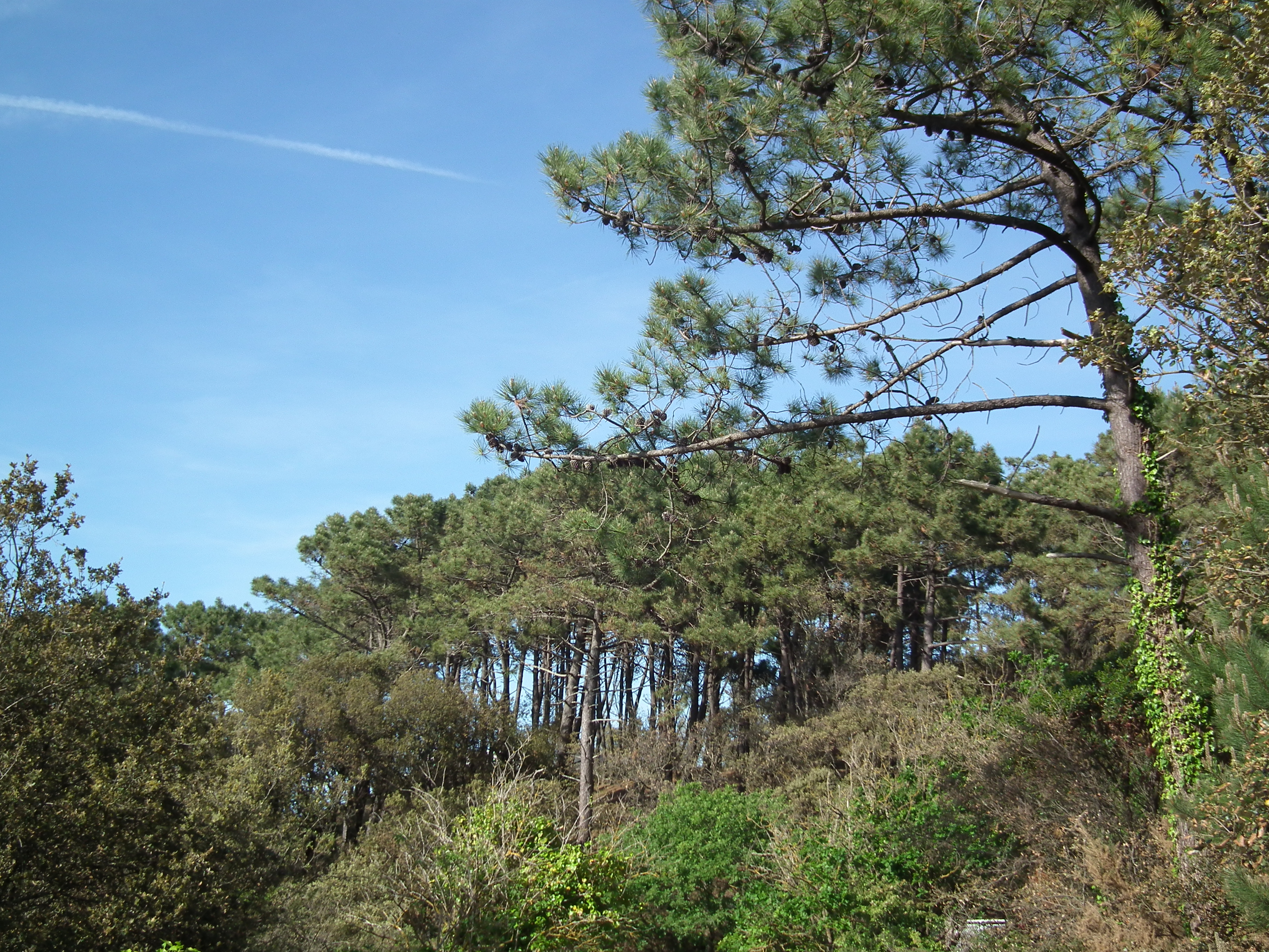 La forêt de Suzac à Saint-Georges-de-Didonne